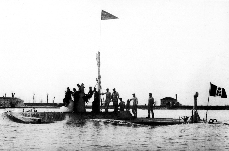 Il sommergibile Delfino